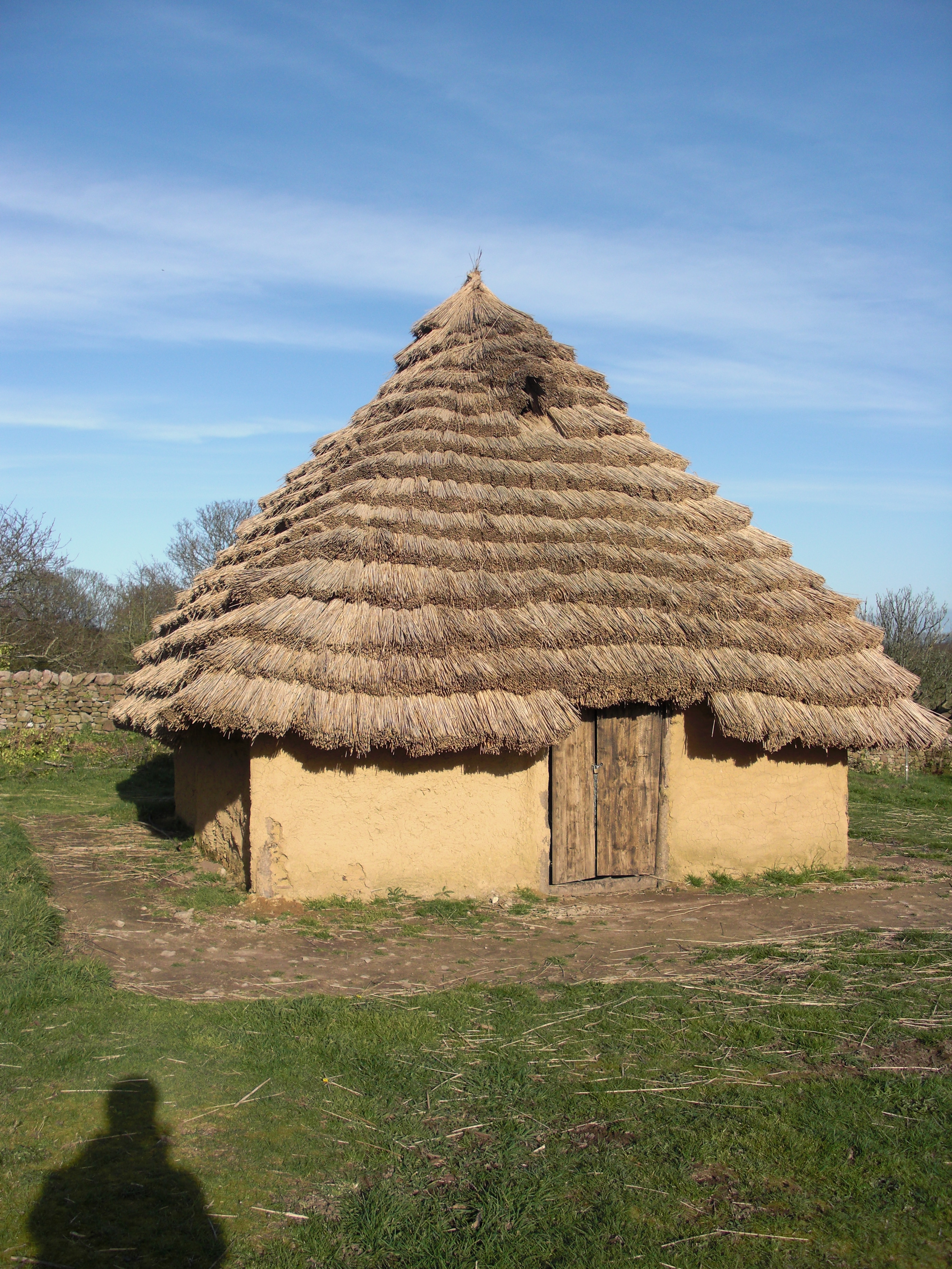 Reconstitution d'une ferme gauloise au Tourp lors d'une exposition à thème